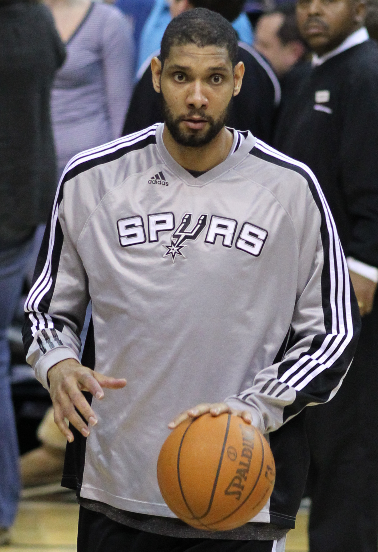 Wizards v/s Spurs 02/12/11